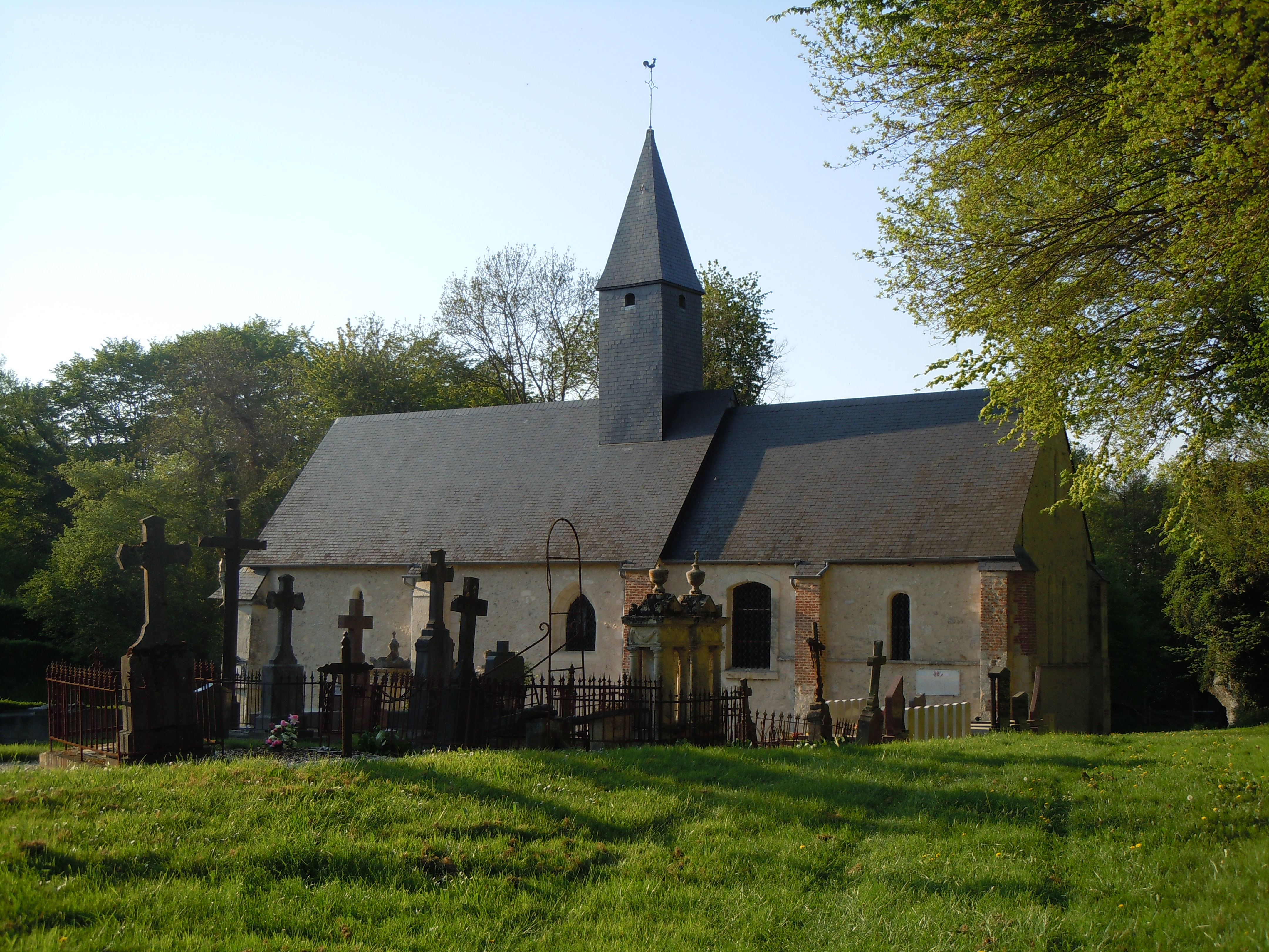 Église Saint-Vaast (XIIIe et XVe siècles), Saint-Vaast-en-Auge, Calvados